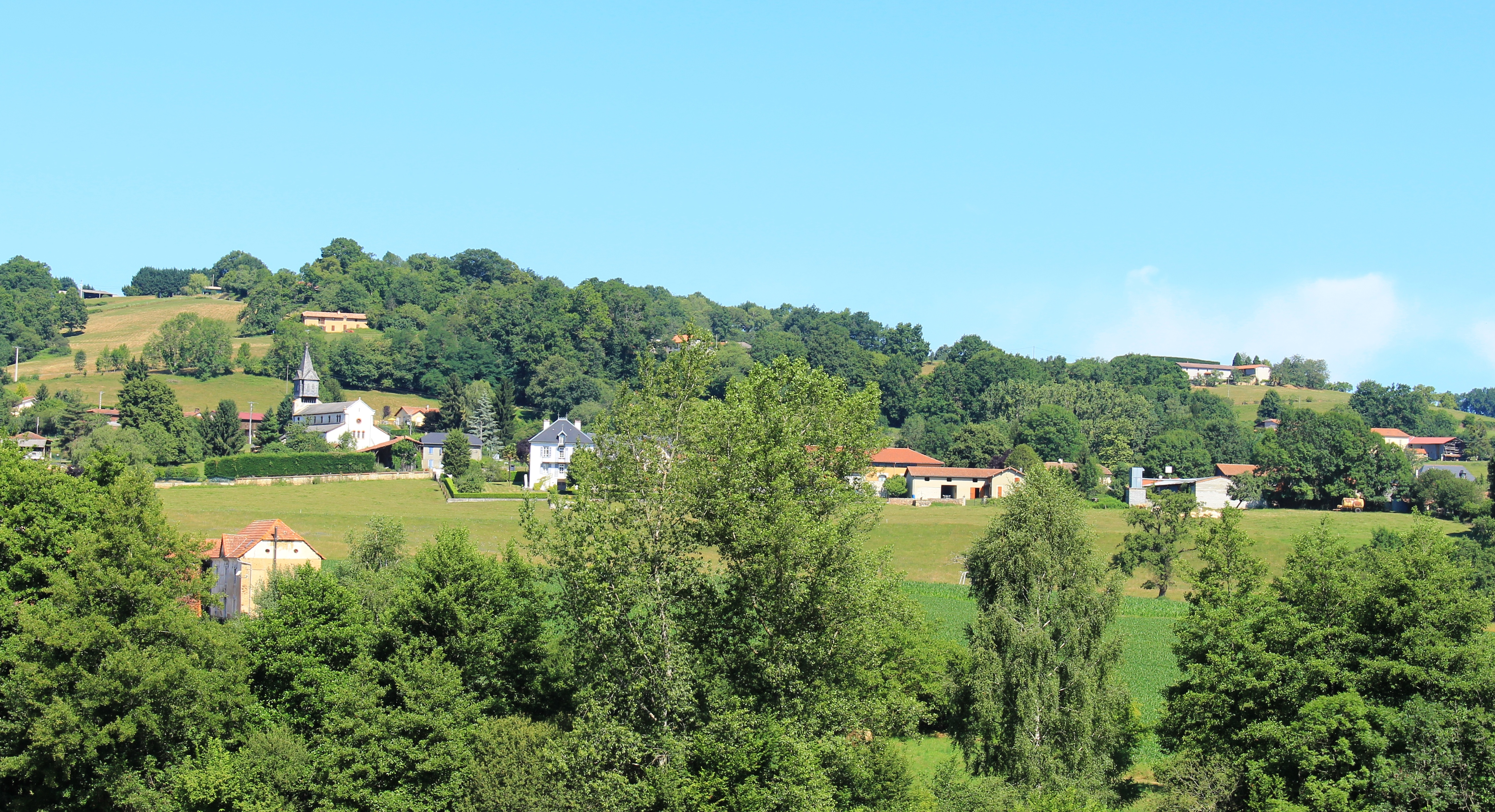 Burg (Hautes-Pyrénées)